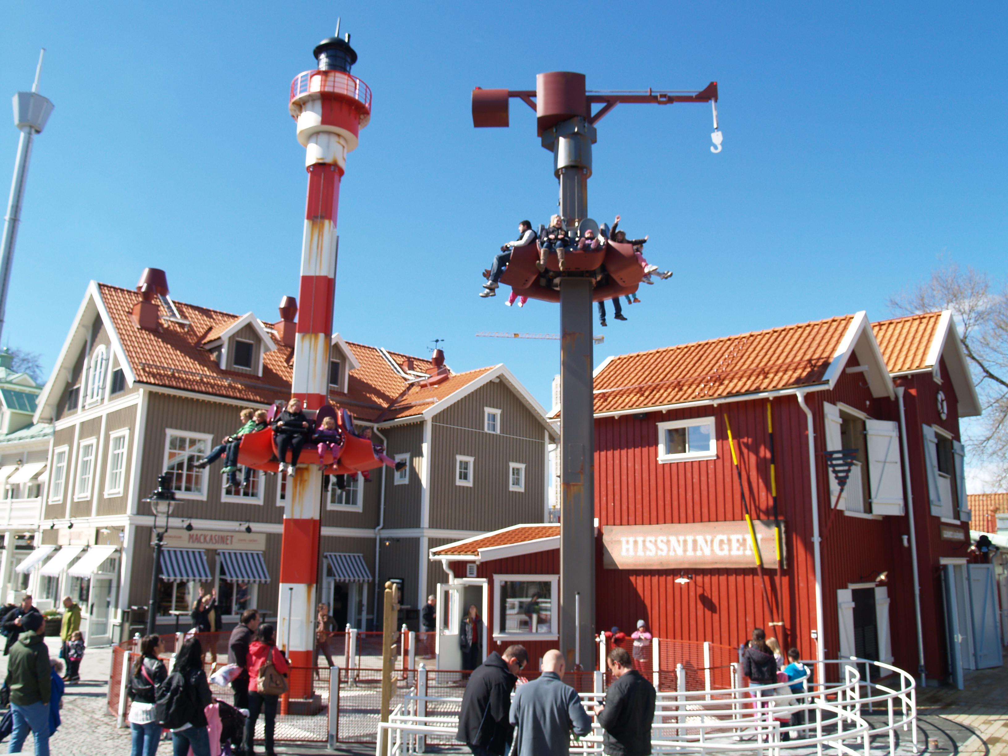 Åkattraktionen Hissningen i nöjesparken Liseberg i Göteborg.